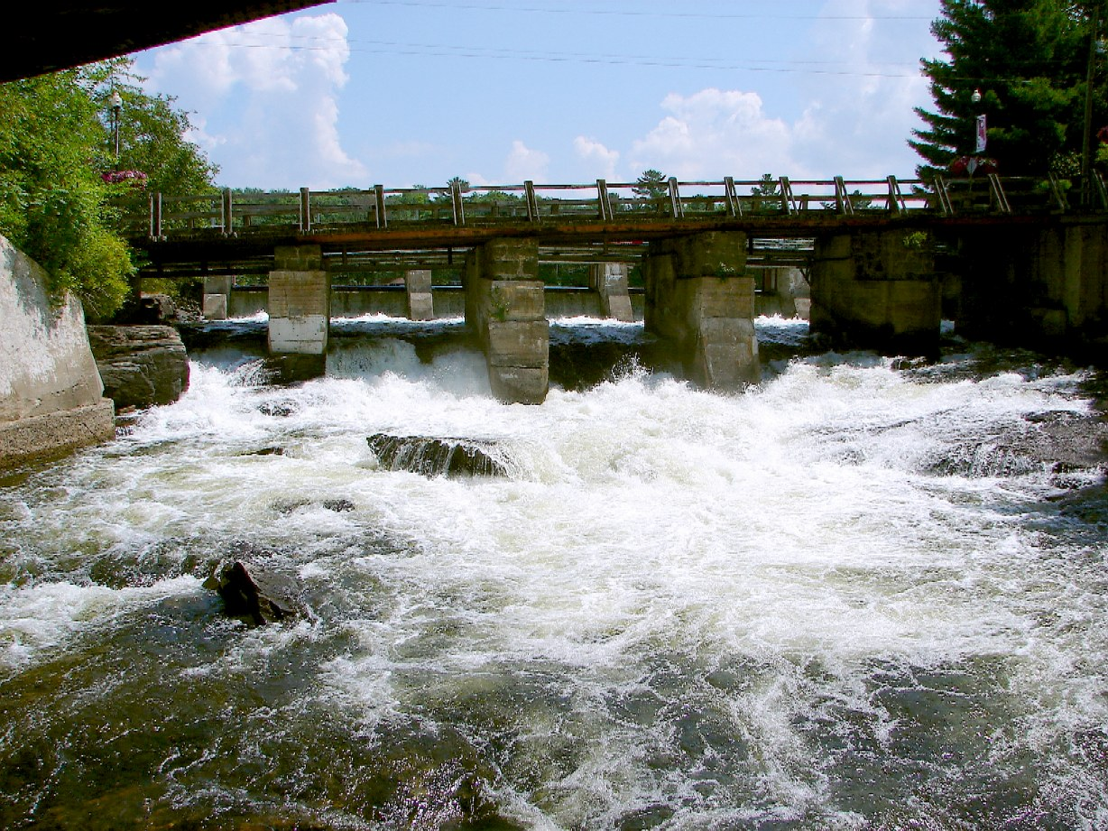 Bala (Muskoka Lakes Township), Ontario, Canada